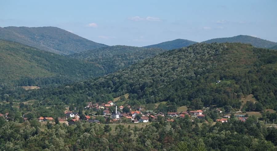 Dorf Spahići im nordwestlichen Teil Bosniens